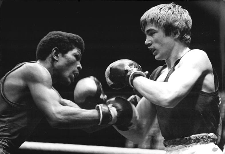 ADN-ZB Lehmann 12.3.82 Halle: XI. Internationales Chemiepokal-Boxturnier - Der 19jährige DDR-Vizemeister Siegfried Mehnert (r.) lieferte im Leichtgewichts-Halbfinale am 11.3. dem 25jährigen kubanischen Landesmeister, Ex-Weltmeister und Olympiasieger von Moskau, Angel Herrera (l.), einen packenden Kampf und siegte überraschend nach Punkten (4:1).